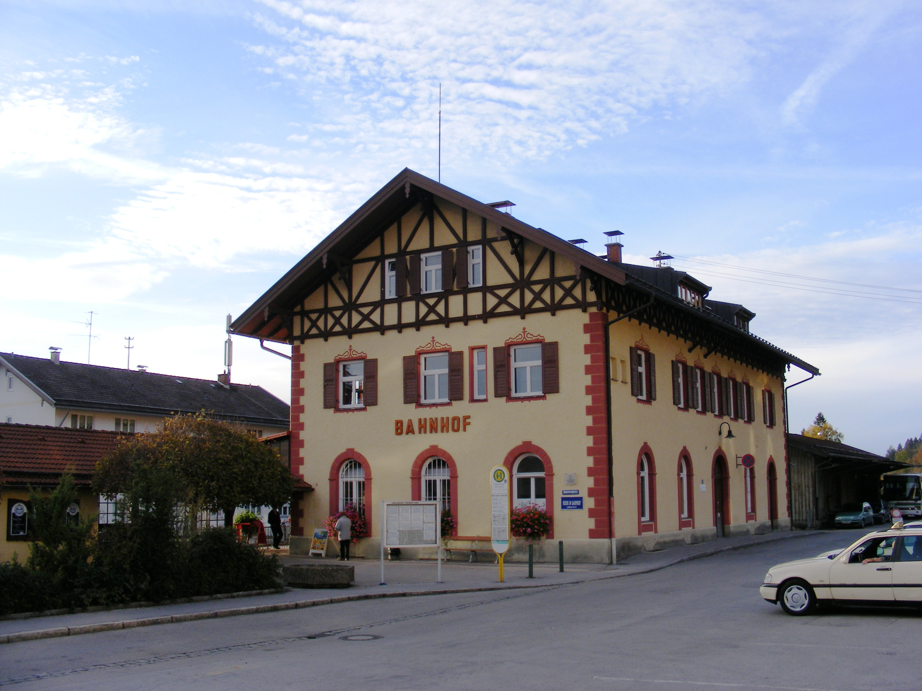 Tegernsee Bahnhof (Landkreis Miesbach, Bayern), erbaut 1902 - Außenansicht von der Straße gesehen. Der Bahnhof wird nur noch durch die BOB sowie durch die Tegernseebahn bedient.